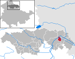 Reinsdorf in Thuringia - Kyffhäuserkreis